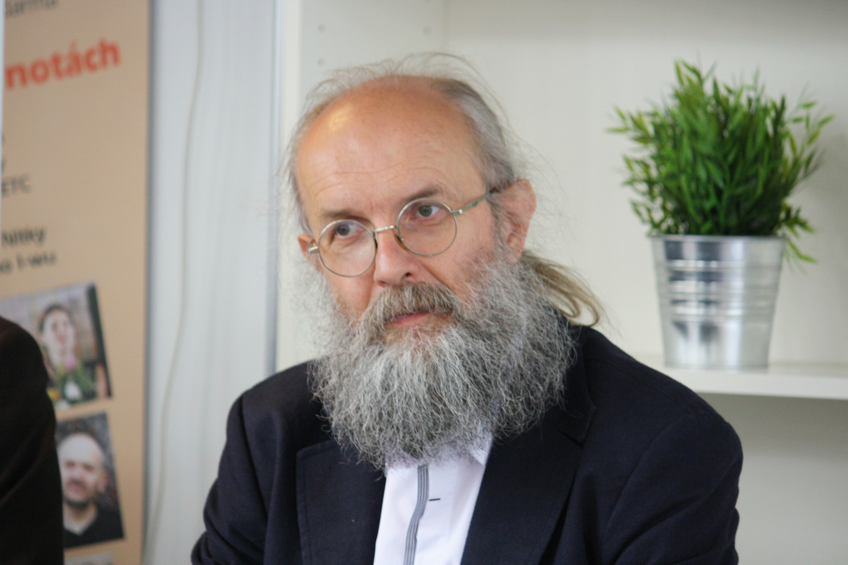 Svět knihy 2013 Personality rights warningAlthough this work is freely licensed or in the public domain, the person(s) shown may have rights that legally restrict certain re-uses unless those depicted consent to such uses. In these cases, a model release or other evidence of consent could protect you from infringement claims.